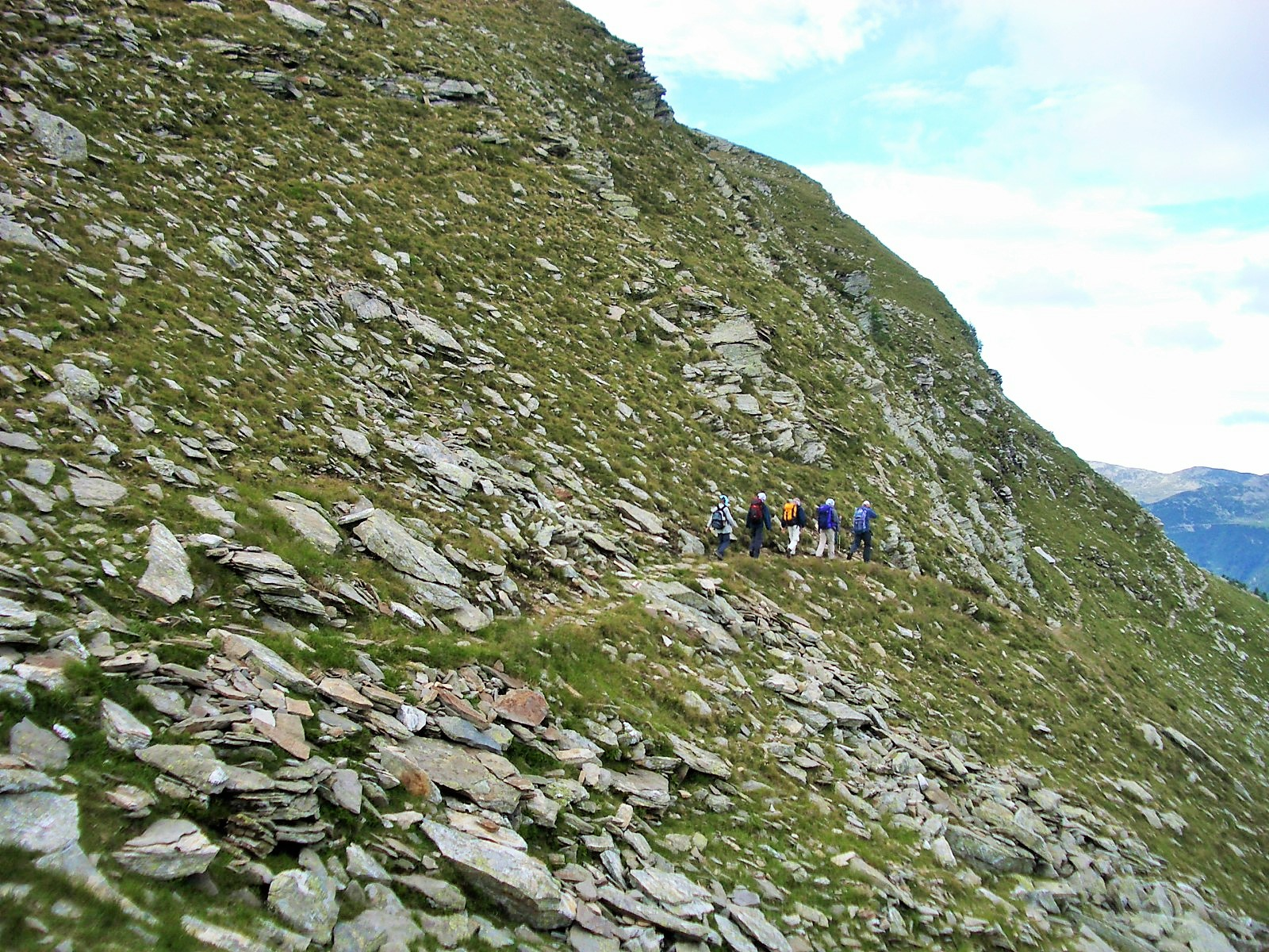 Calanca Valley GR, Switzerland: Höhenweg in der Nordwestflanke des Nomnom, nach dem Buffalorapass. self-made, August 2006